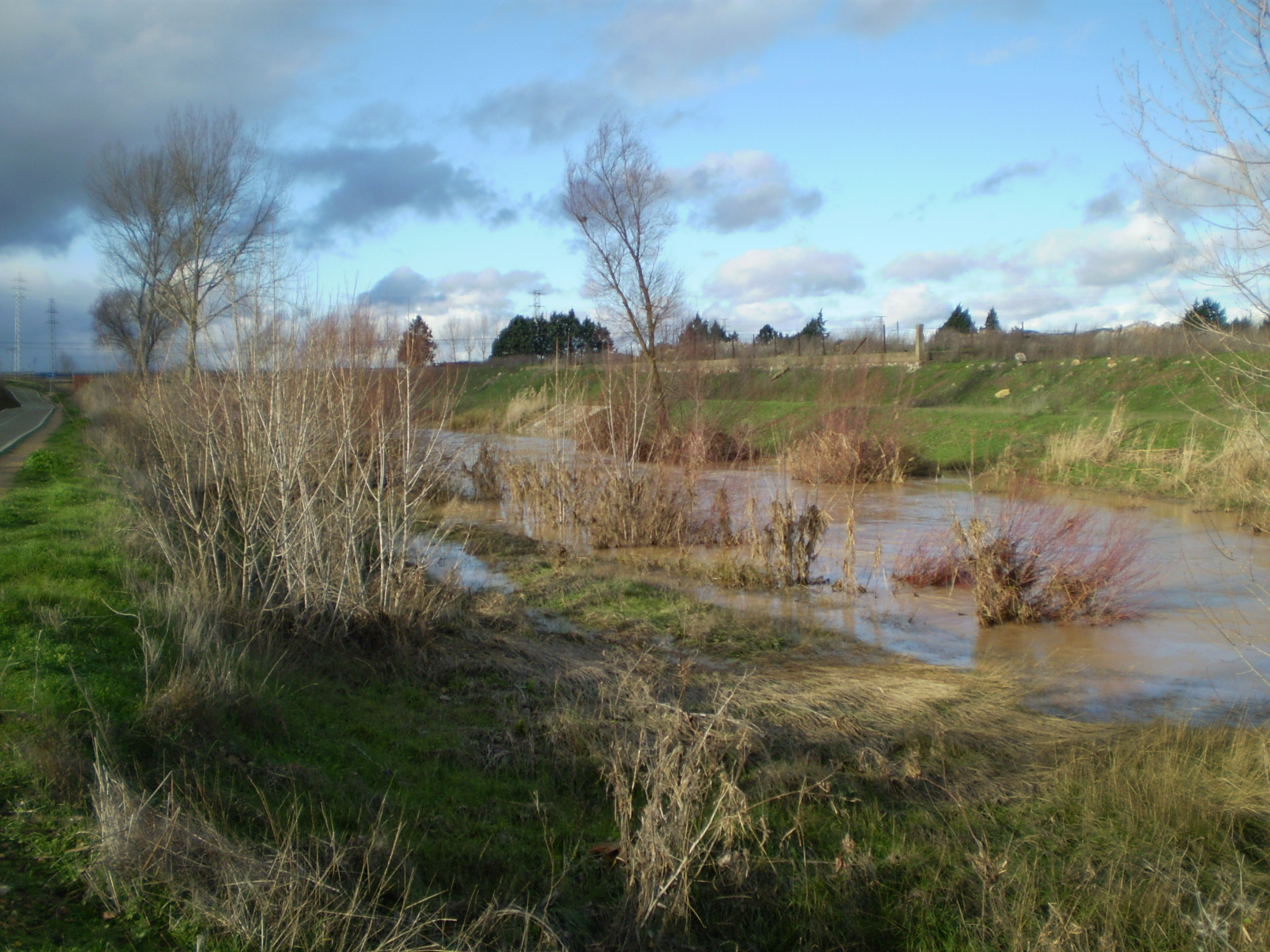 Río Valderaduey cerca de su desembocadura en el río Duero con una gran crecida.